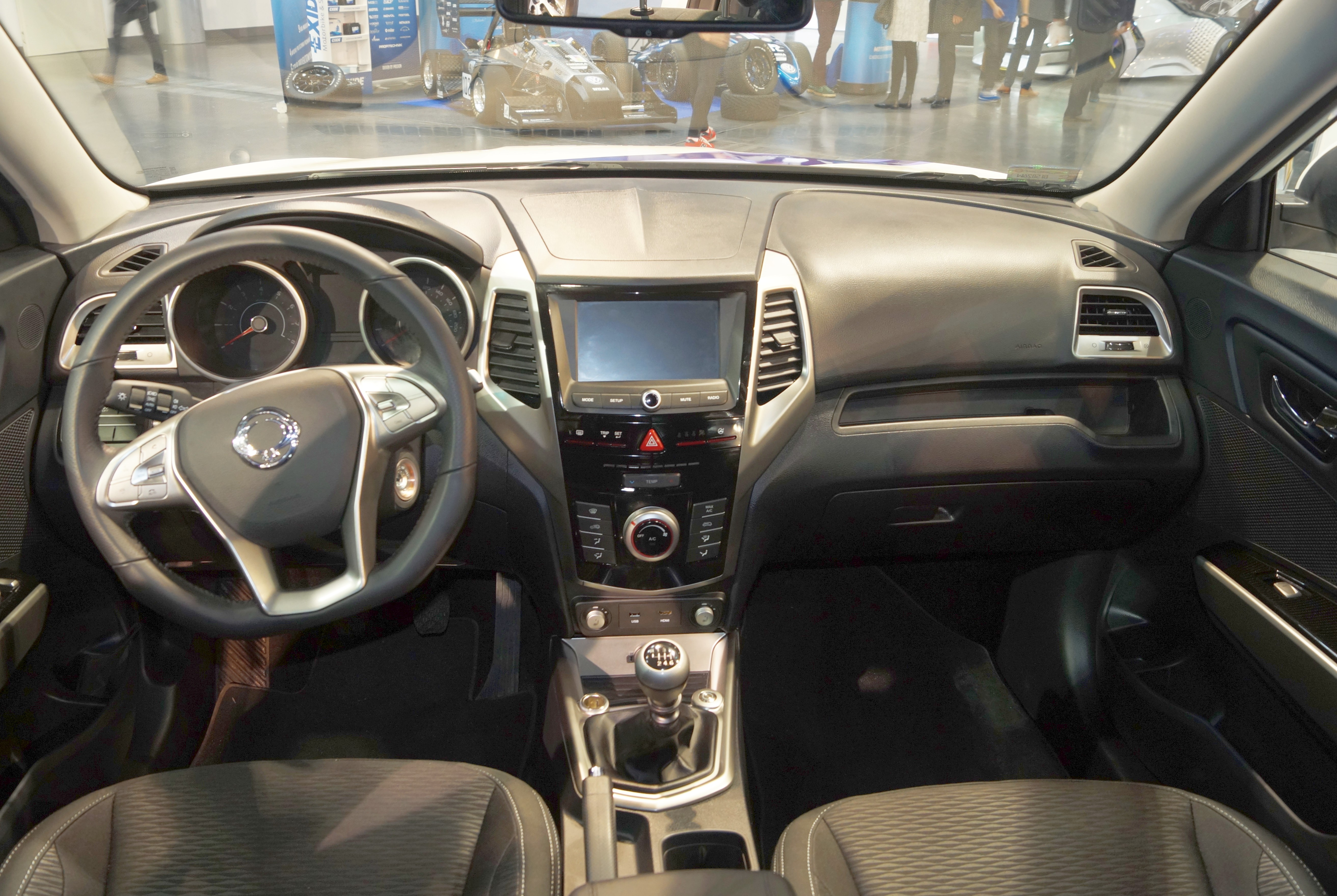 Wnętrze SsangYonga Tivoli na Motor Show Poznań 2017.